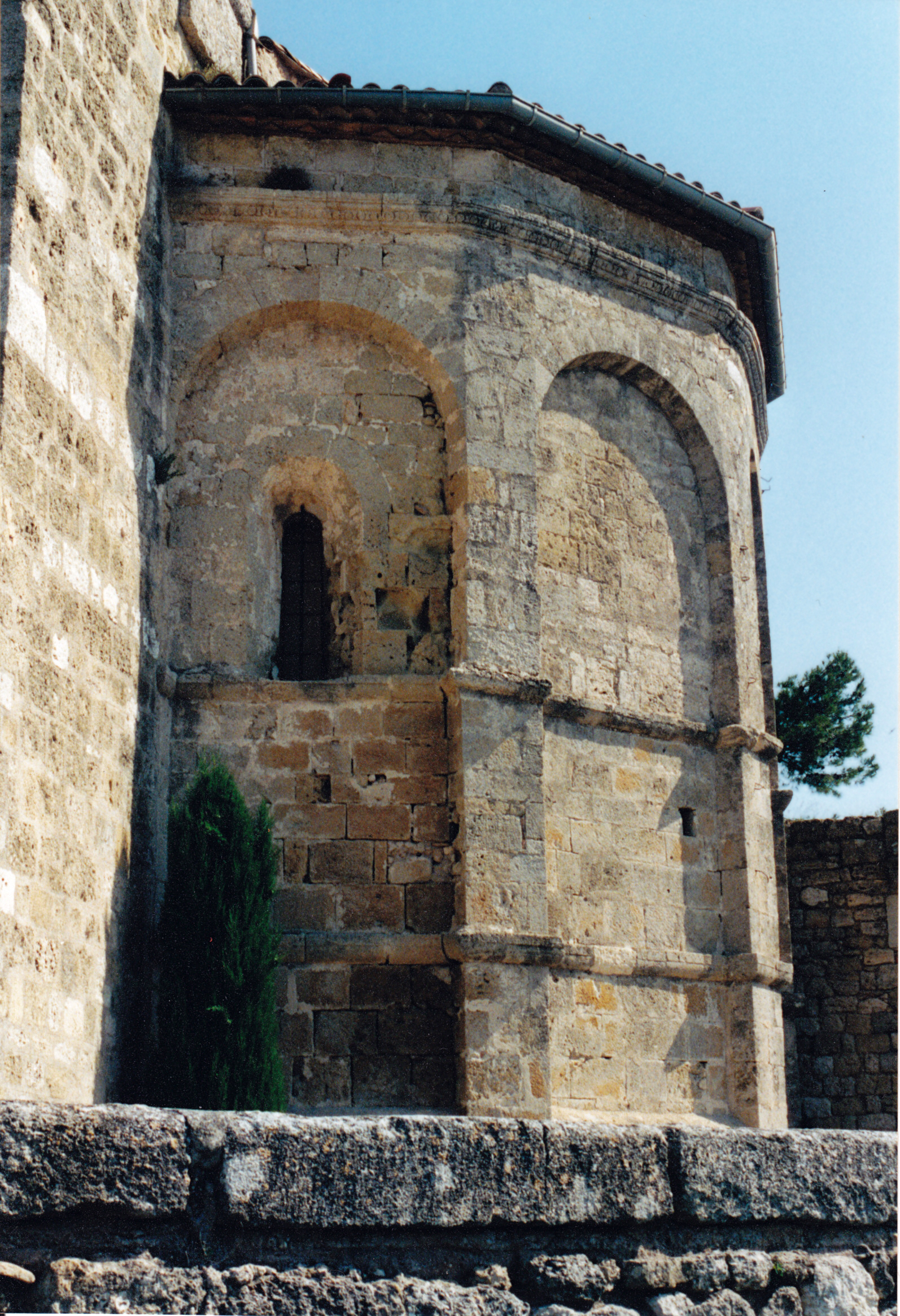 France - Languedoc - Hérault - Église de Saint-Pons-de-Mauchiens